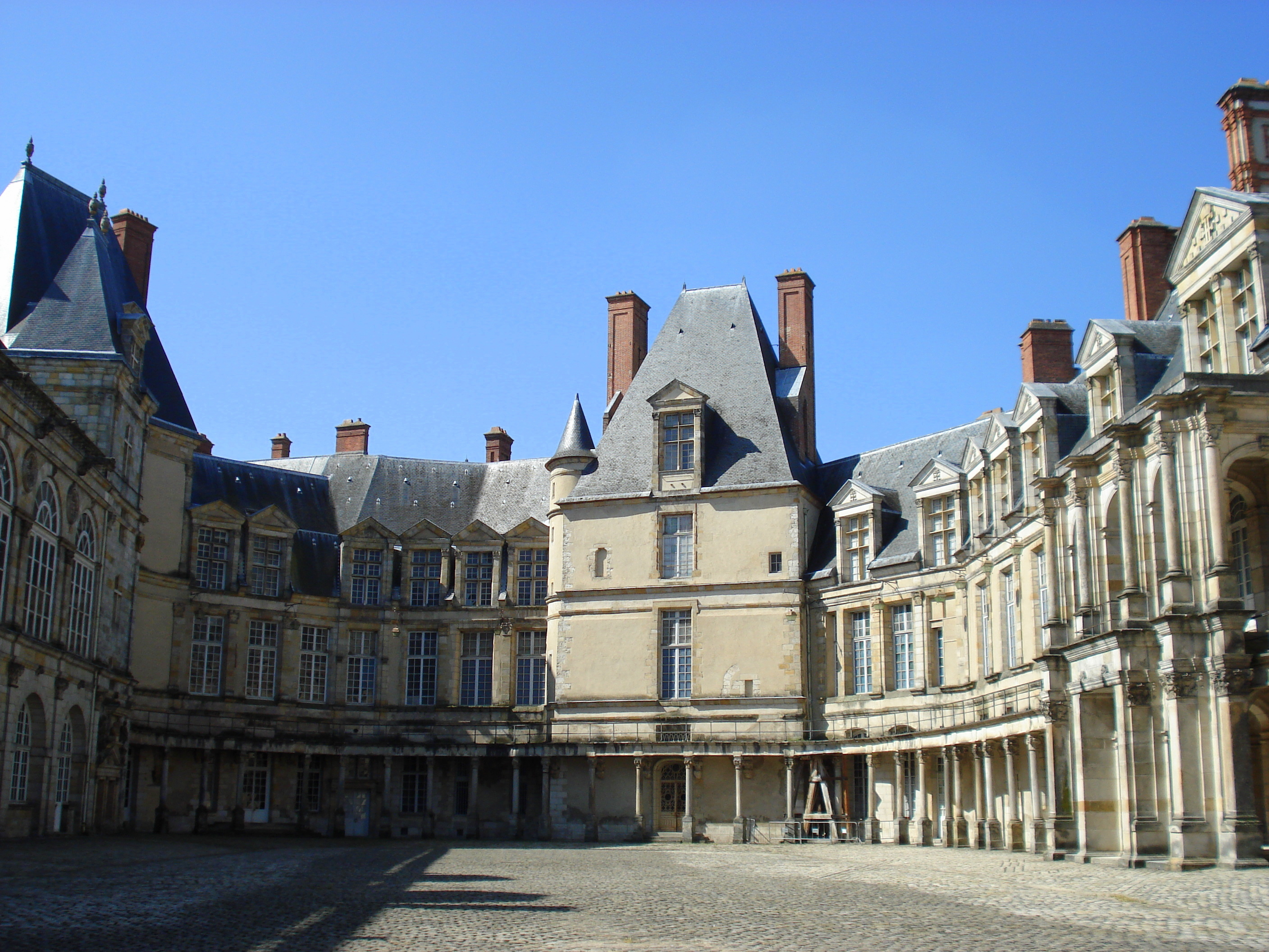 Schloss Fontainebleau, Ovaler Hof